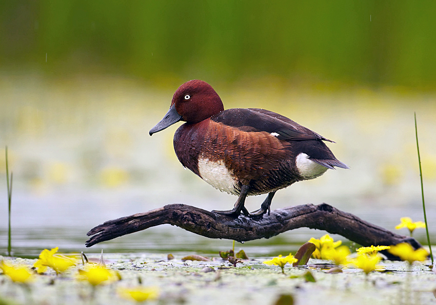 Aythya nyroca - male, Hortobágy, Hungary